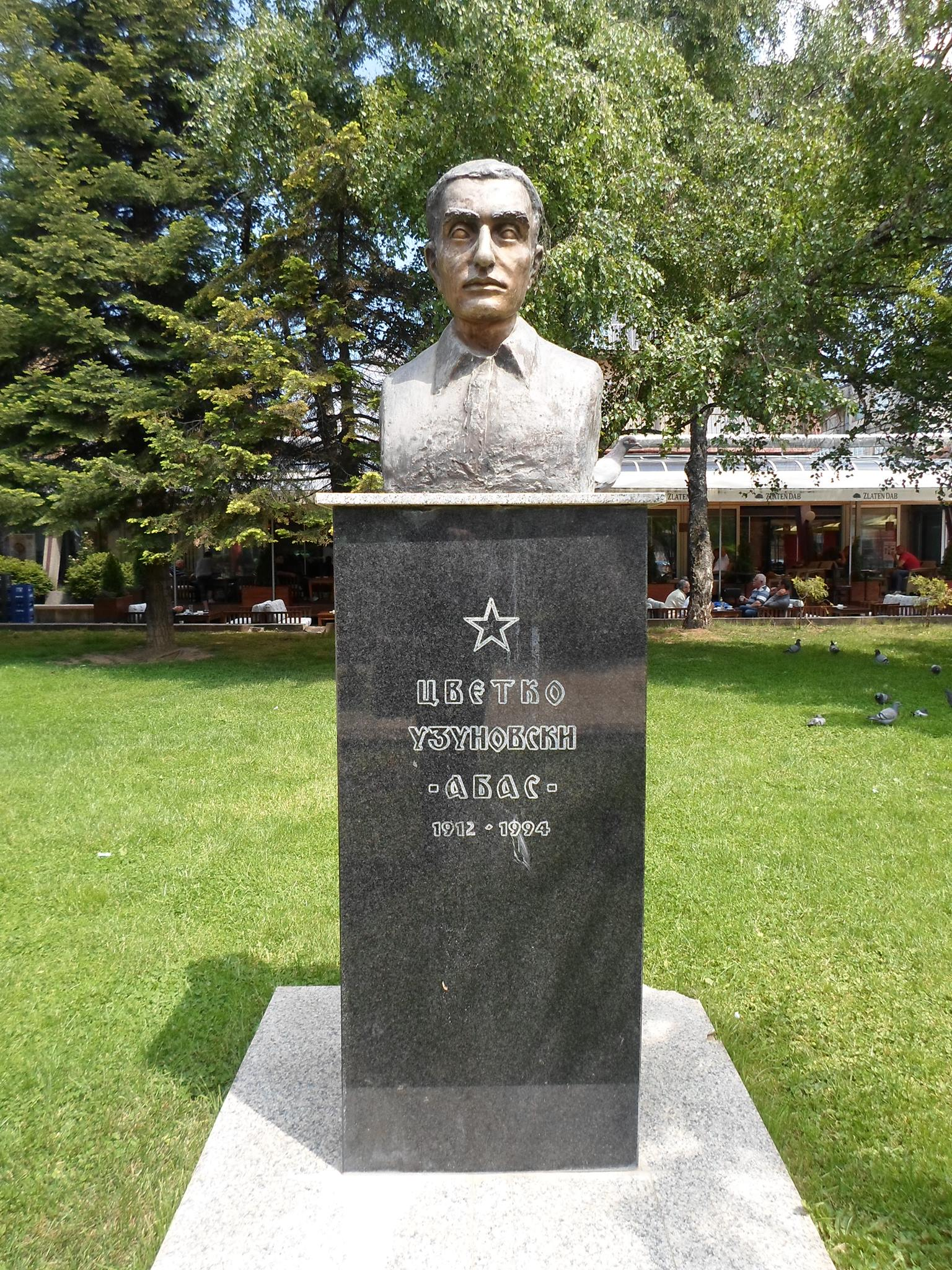 Биста на Цветко Узуновски во Ресен